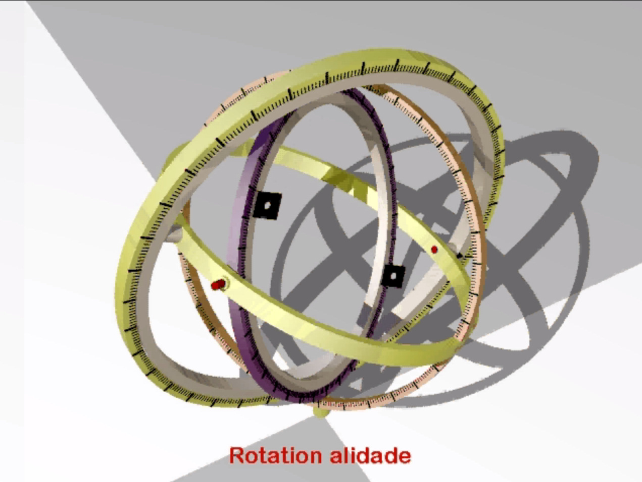 Vue partielle de l'Organon de Ptolémée